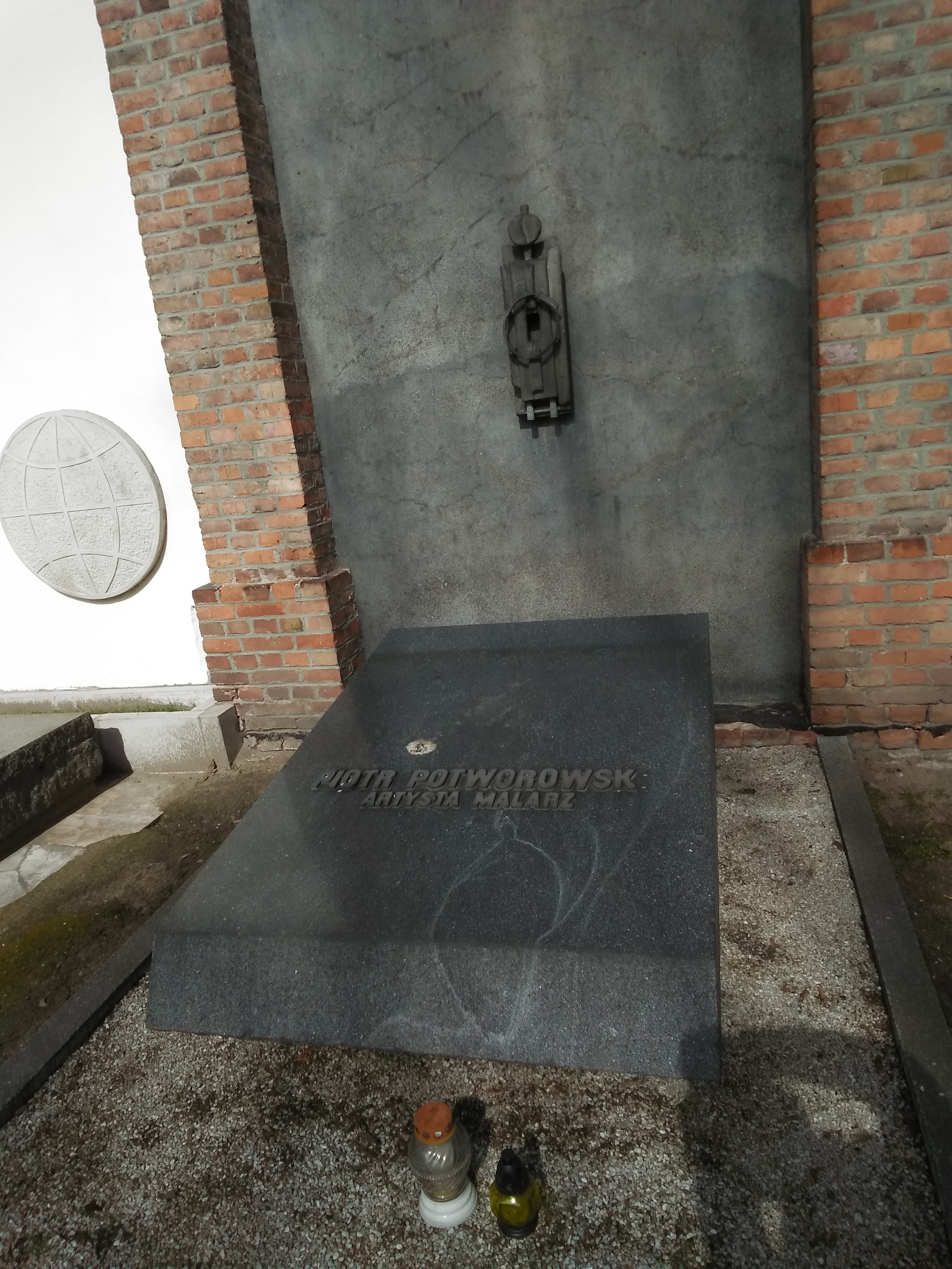 Grób Piotra Potworowskiego na Cmentarzu Powązkowskim